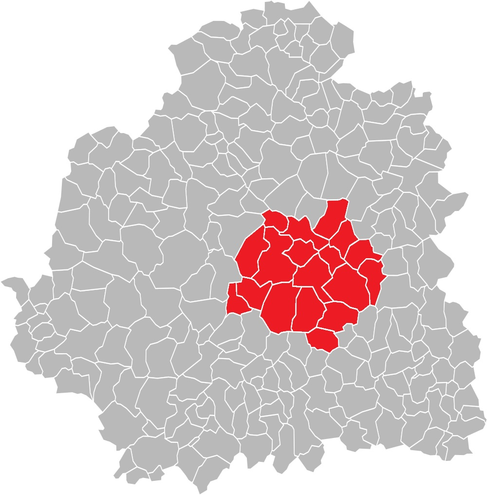 Carte des communes de l'Indre (36) : La première circonscription de 1988 à 2012.